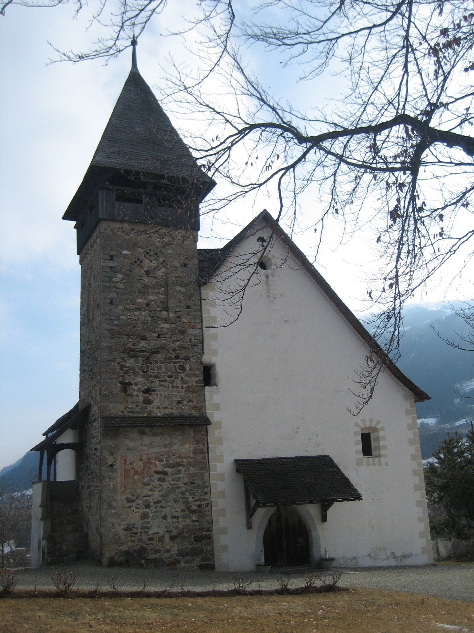 Westseite